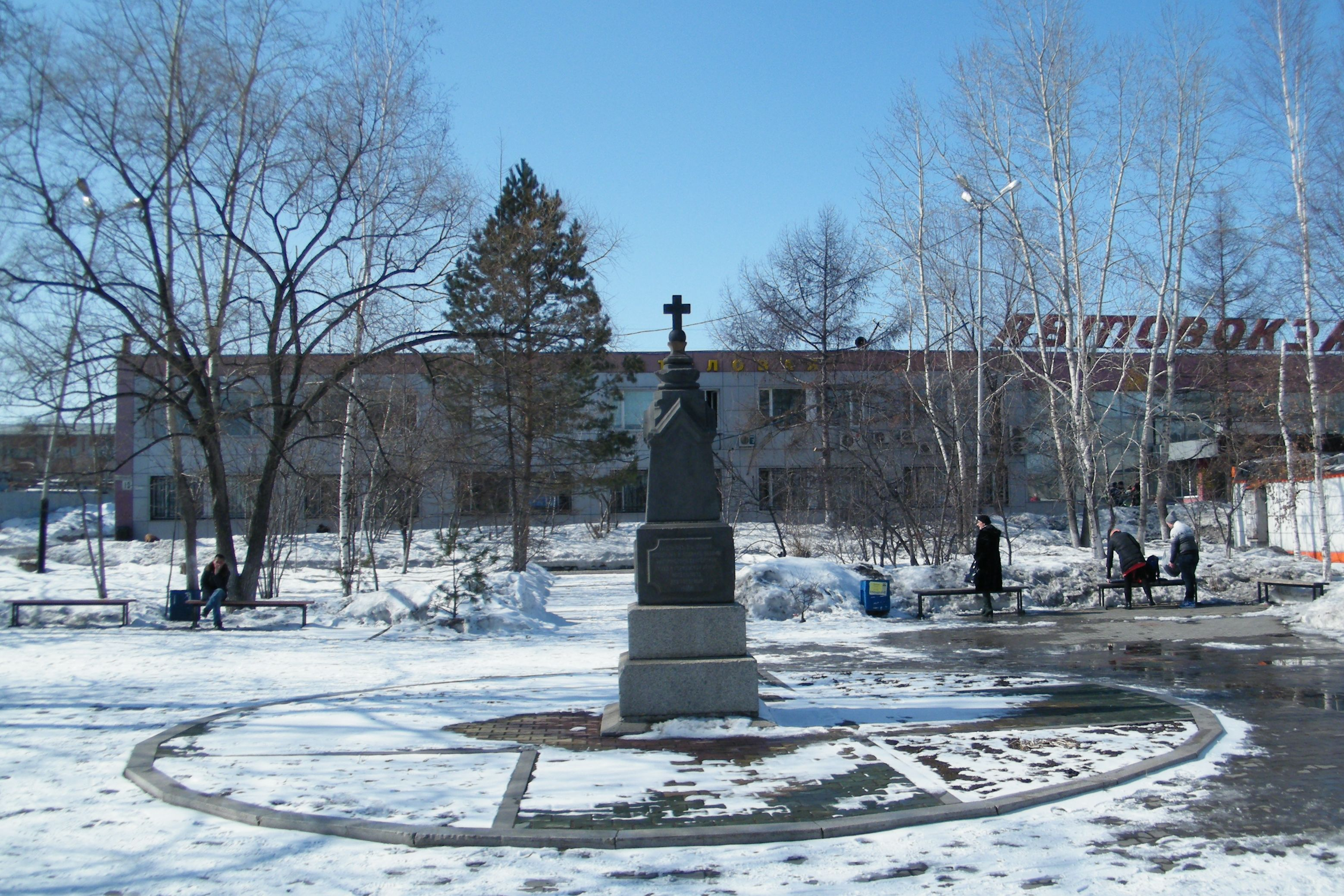 Умершим в плену офицерам и нижним чинам австрийской и венгерской как и германской армии посвящают их товарищи 1916. Памятник в Хабаровске.